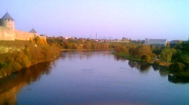 Río Narva entre Ivangorod y ciudad Narva